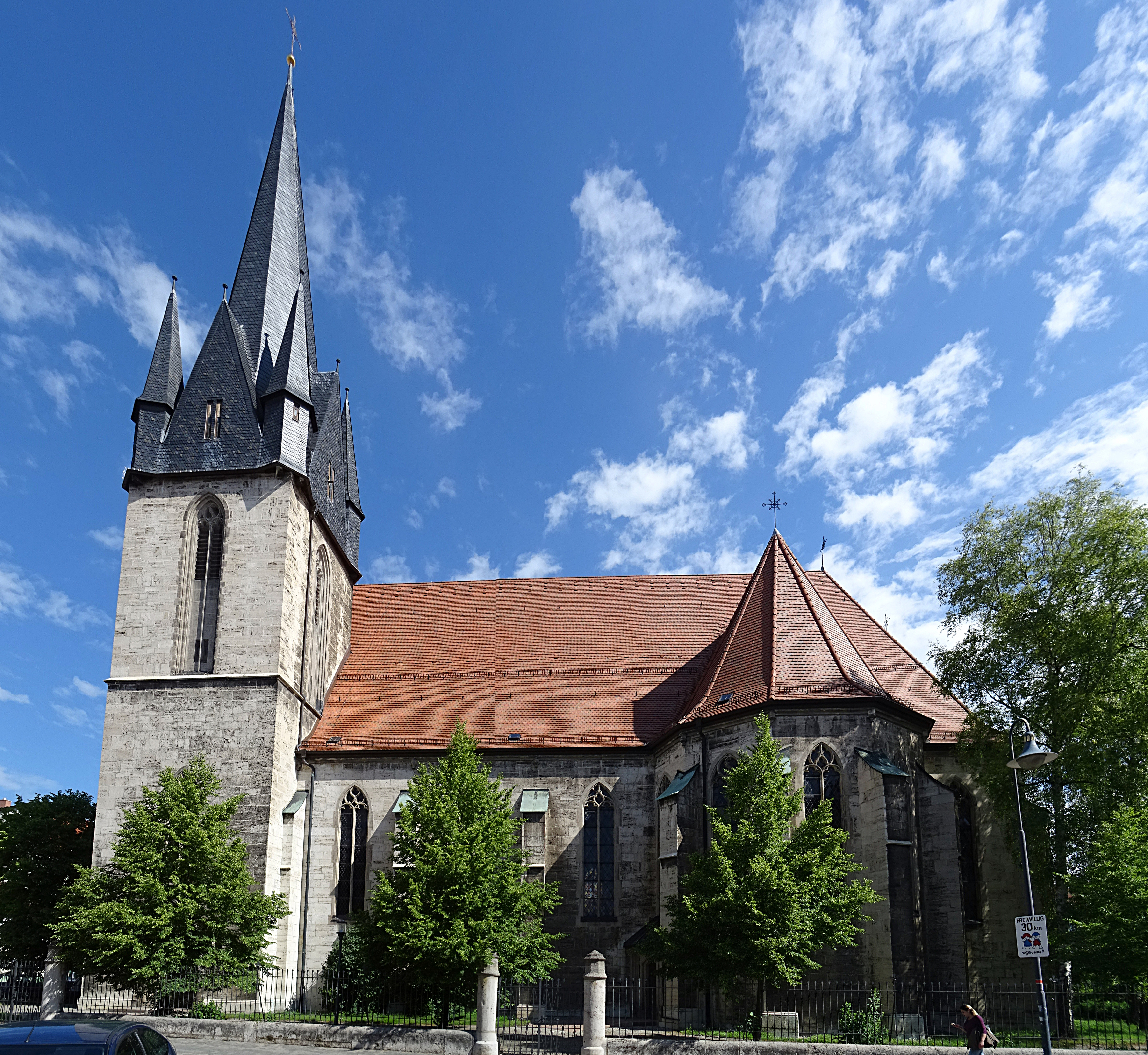 Pfarrkirche St. Josef (Mühlhausen) von Süden